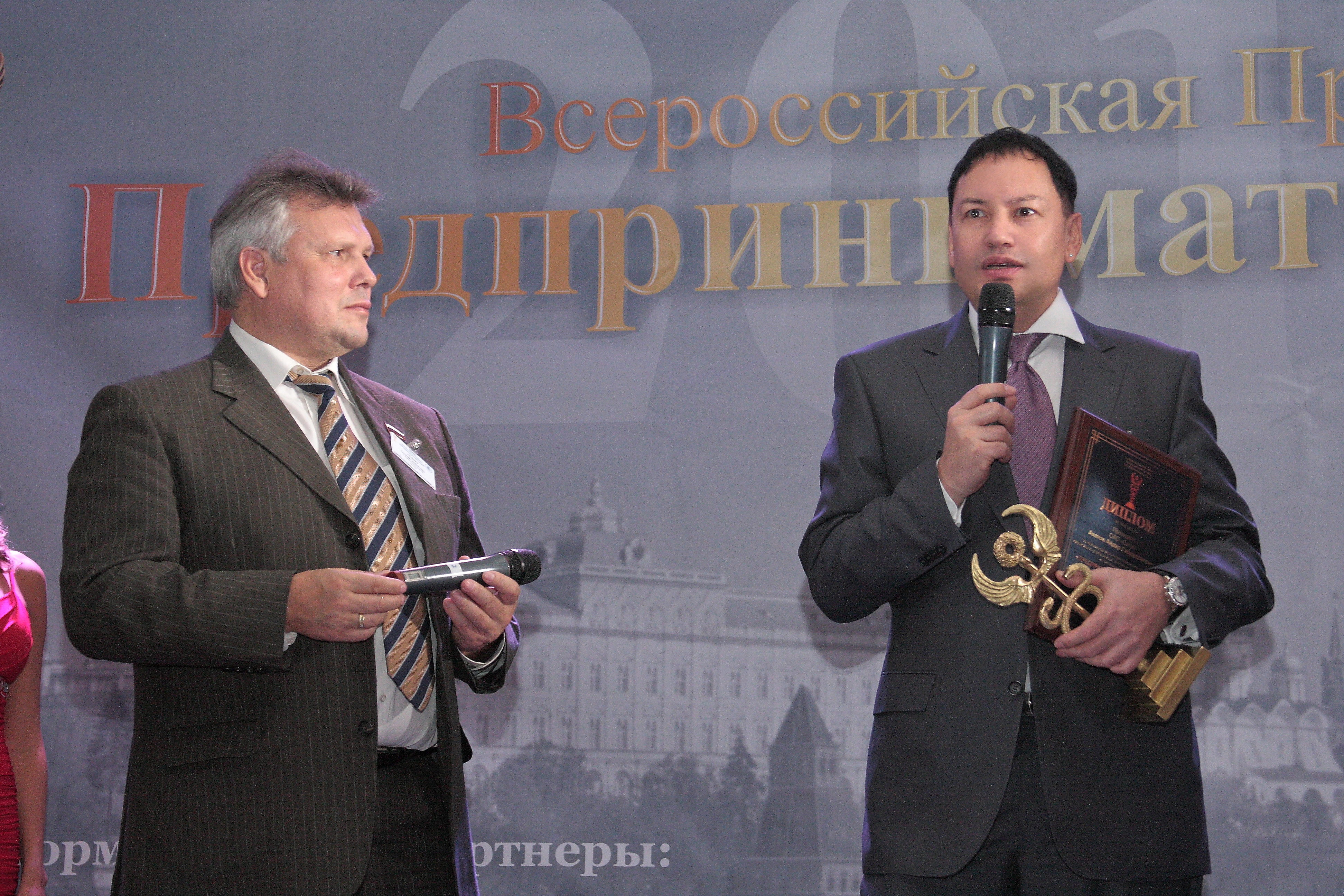 Aydar Akhatov, President of the "CITY" (pictured right). "President-Hotel", Moscow, October 5, 2010.